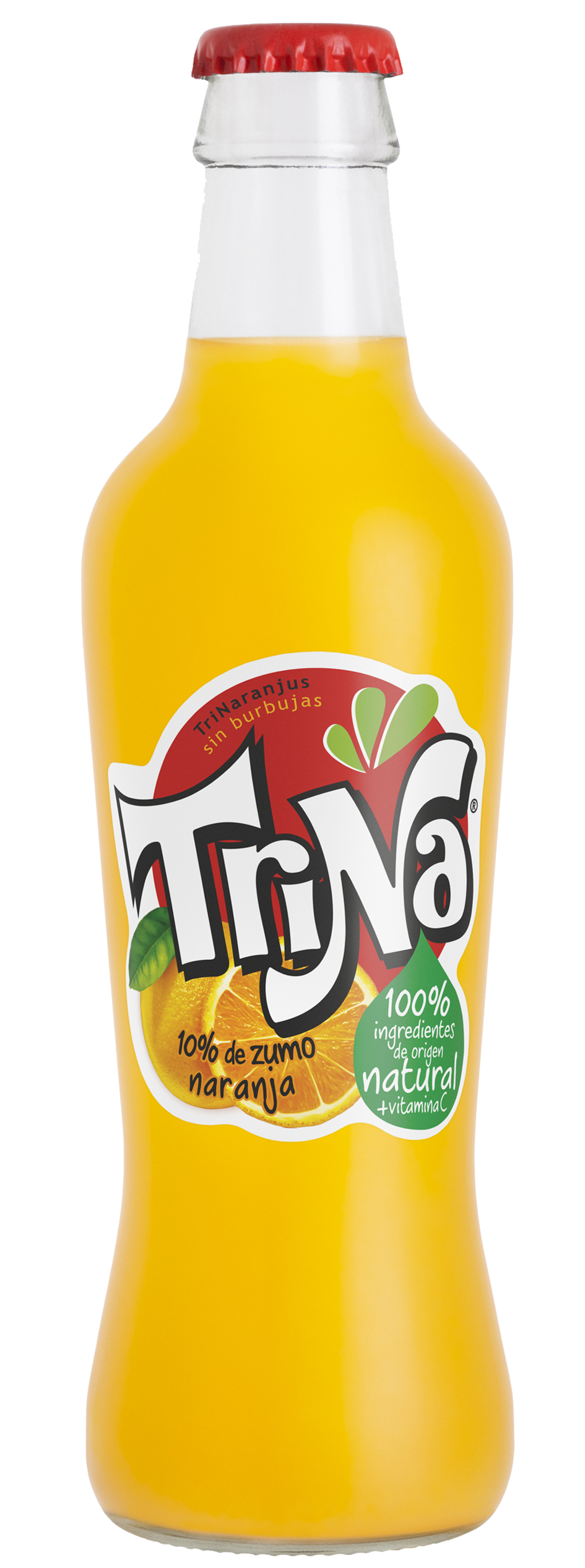 TriNa de naranja